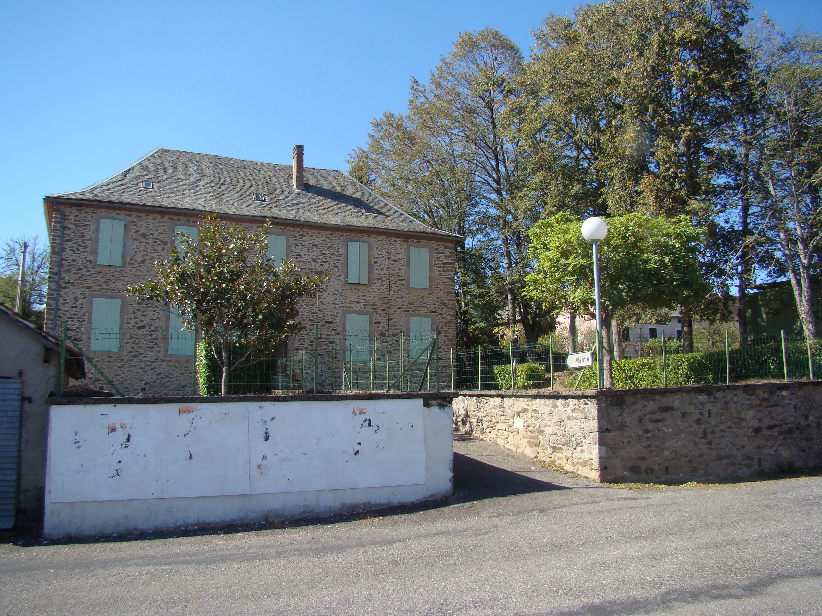 Mairie de Jouqueviel